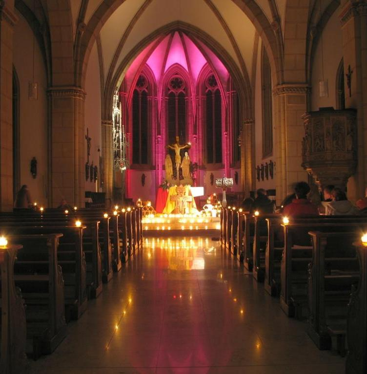 Wiedenbrück, St. Aegidiuskirche, Innenraum, Taizé-Abend, Nacht der Lichter